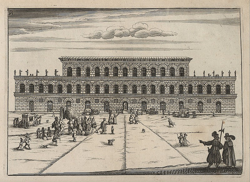 Original image description from the Deutsche Fotothek Architektur & Gebäude